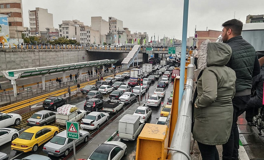 در جریان اعترضات مردمی به سهمیه‌بندی بنزین در ایران، توقف عمدی خودروها در انتقاد به گرانی بنزین در بعضی بزرگراه‌های تهران، موجب ترافیک سنگین و طولانی ماشین‌ها شده در این بزرگراه‌ها شده و صف طولانی از ماشین‌ها را متوقف کرده‌است. برخی رانندگان نیز با زدن بوق نسبت به گرانی بنزین اعتراض می‌کنند.